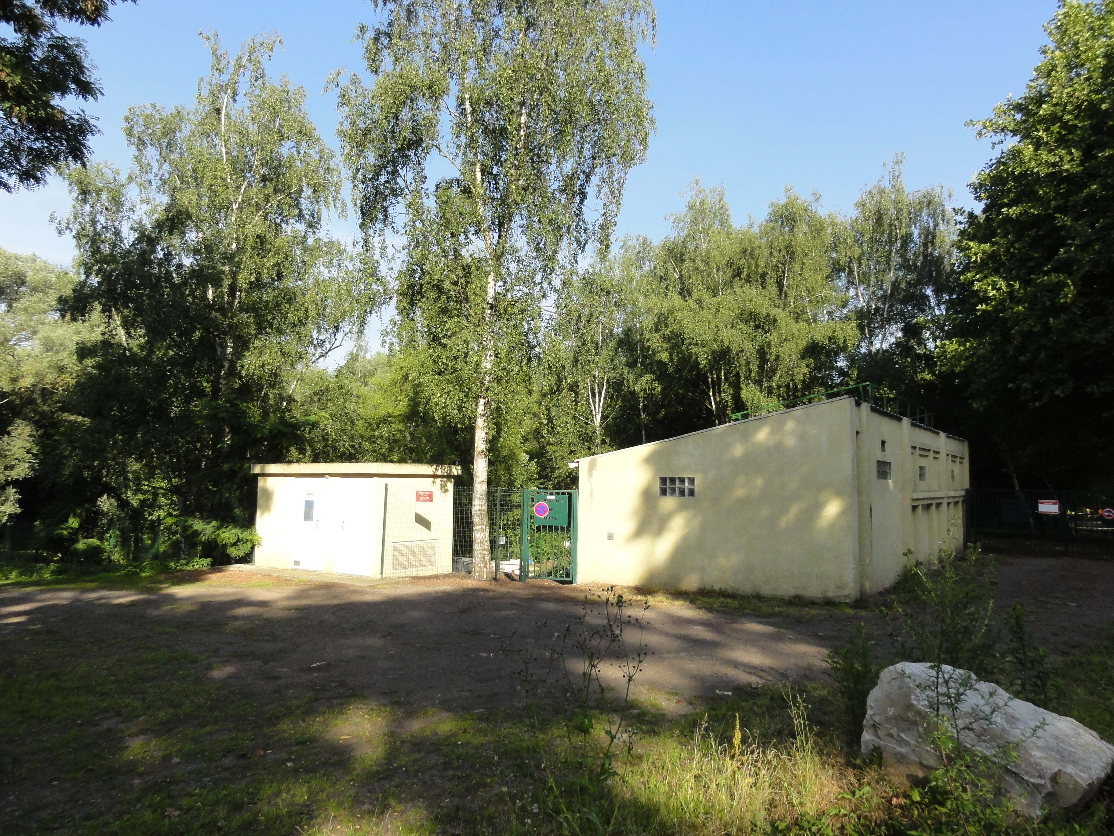 La centrale de Dechy a été ouverte par le Groupe de Douai à Dechy, Nord, Nord-Pas-de-Calais, France.